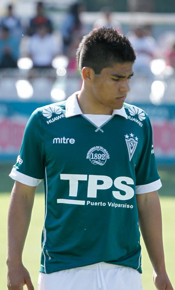 Fotografía del jugador de fútbol Bryan Chepulich en el Santiago Wanderers.